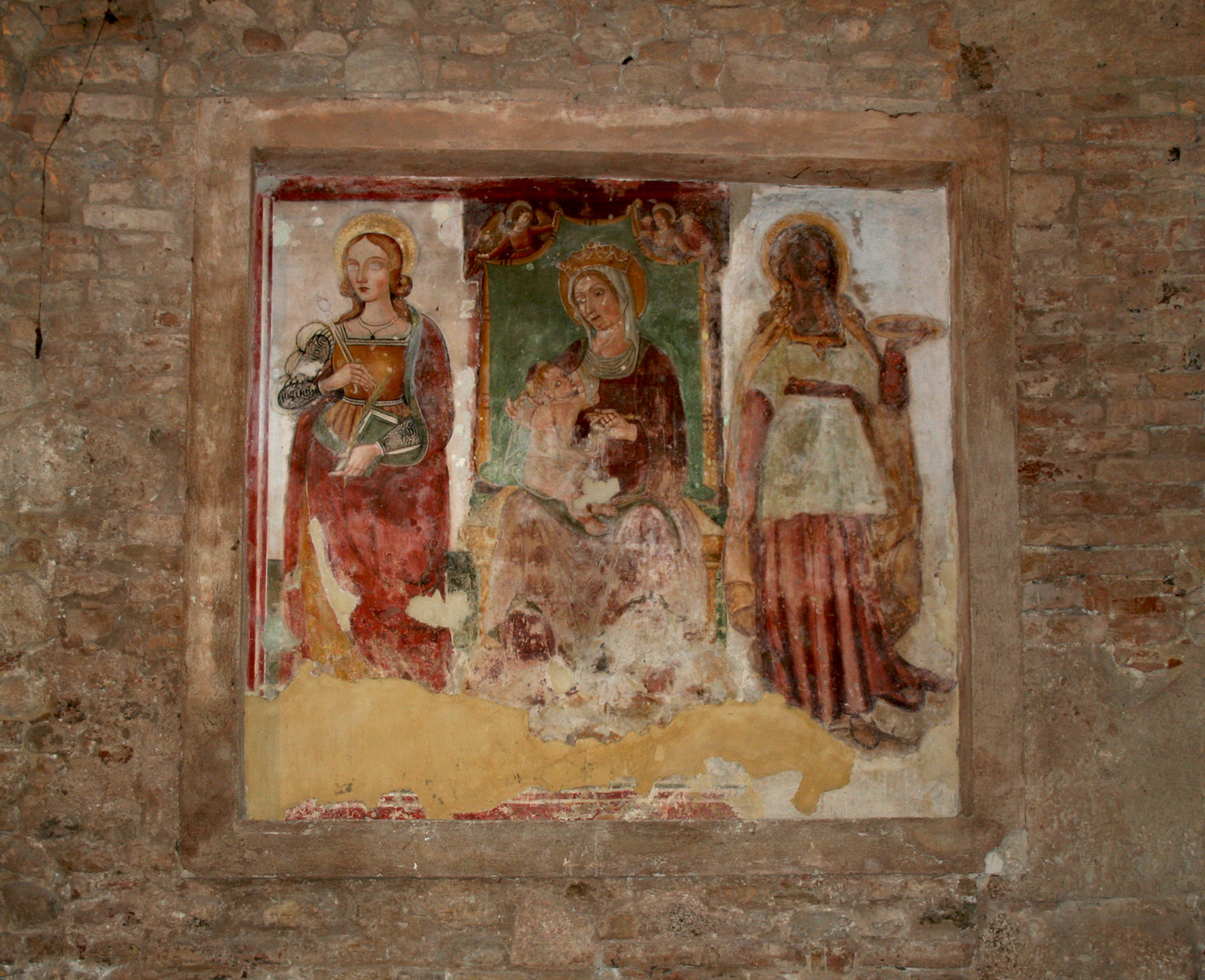 Chiesa di Sant'Anna dei Pompetti di Teramo, interno, Un sentito ringraziamento a Don Paolo Di Mattia, parroco della chiesa di Sant’Antonio in Teramo, che ha consentito lo scatto di questa immagine.